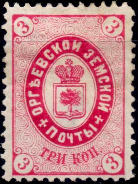 Земская марка. Оргеевский уезд № 15 (1885 г.)